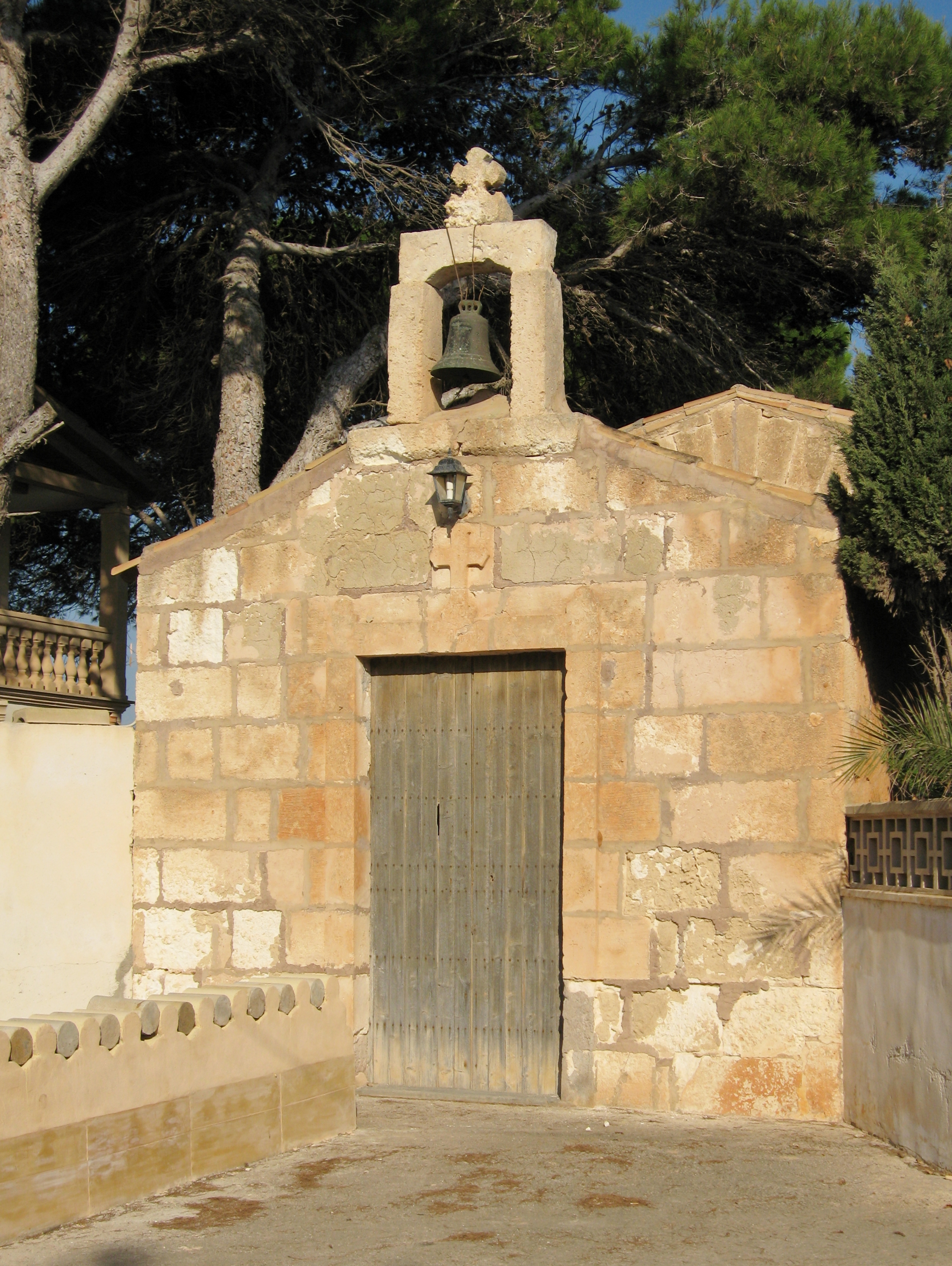 Kapelle der Siedlung Cala Morlanda, Gemeinde Manacor, Mallorca, Spanien